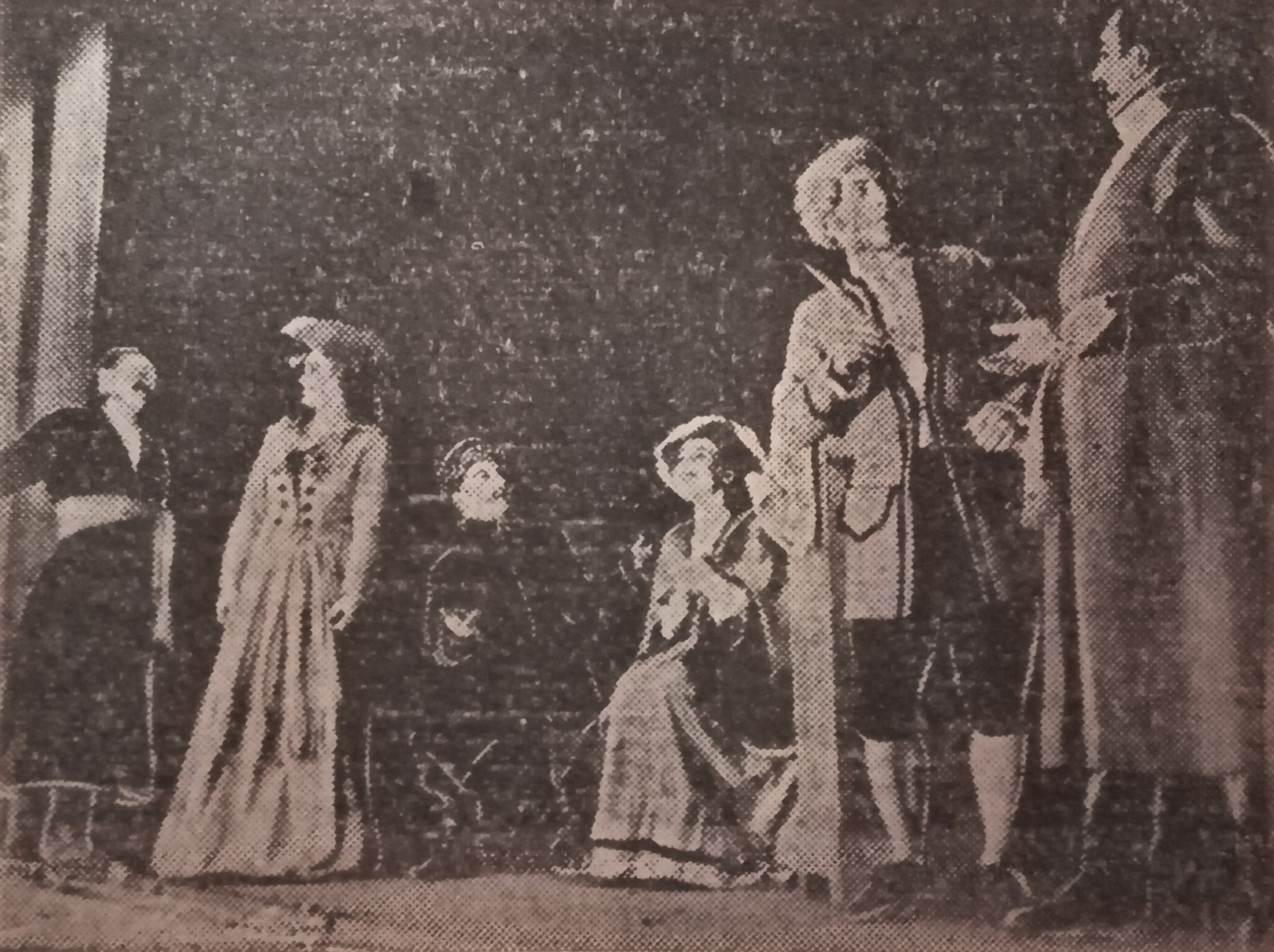 Nasz Teatr w Lublinie - 1948 r. "Żona Modna" Krasickiego w reż. Ireny Parandowskiej.